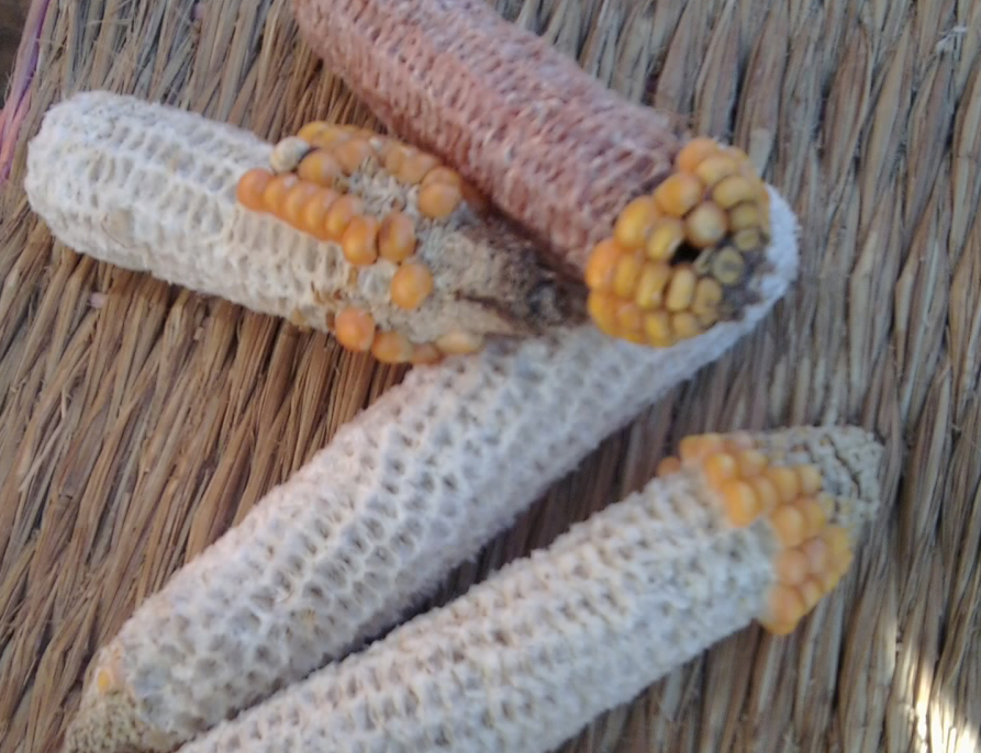 नेपाली: मकैको खोया